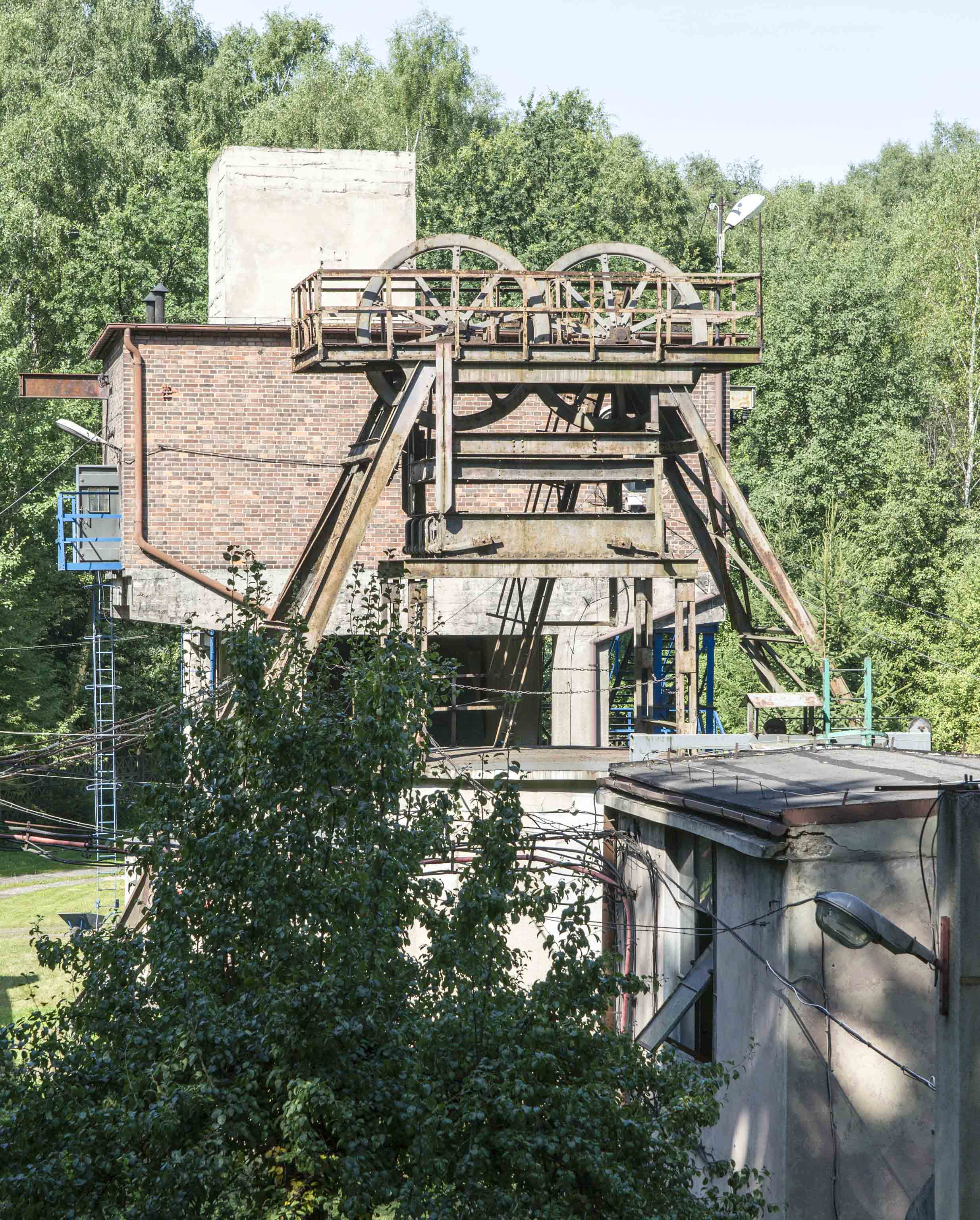 Grube Castellengo in Zabrze, Polen, Wetterschacht Mikołaj